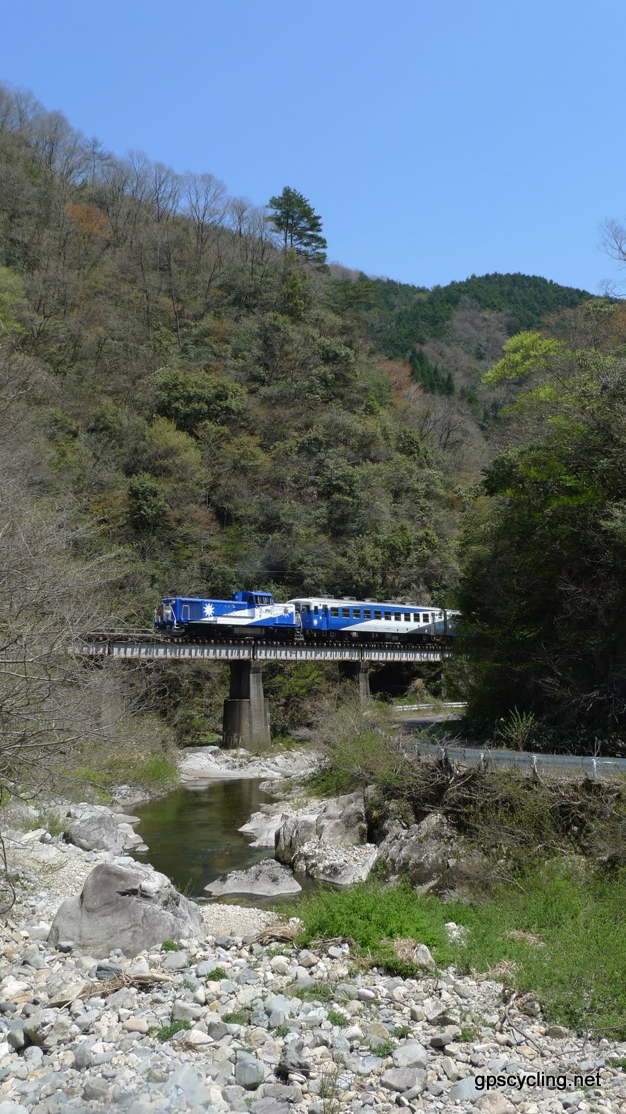 奥出雲おろち号